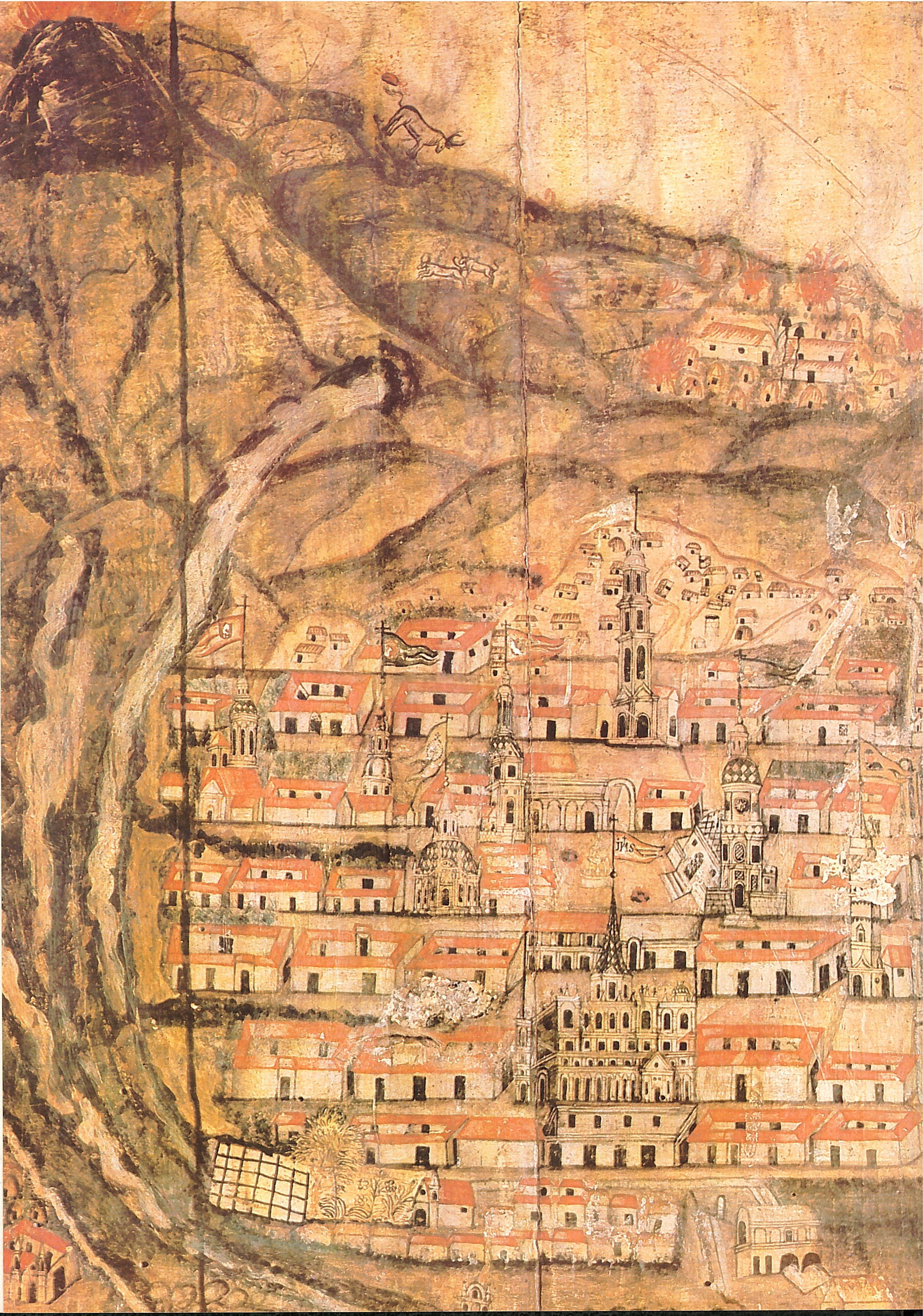 Vargas, José María; Cevallos García, Gabriel y otros investigadores. (1985).Historia del Arte Ecuatoriano Tomo 2. Salvat Editores S.A. Barcelona, España – Quito, Ecuador. Consultado y compartido por J. Javier G. A.